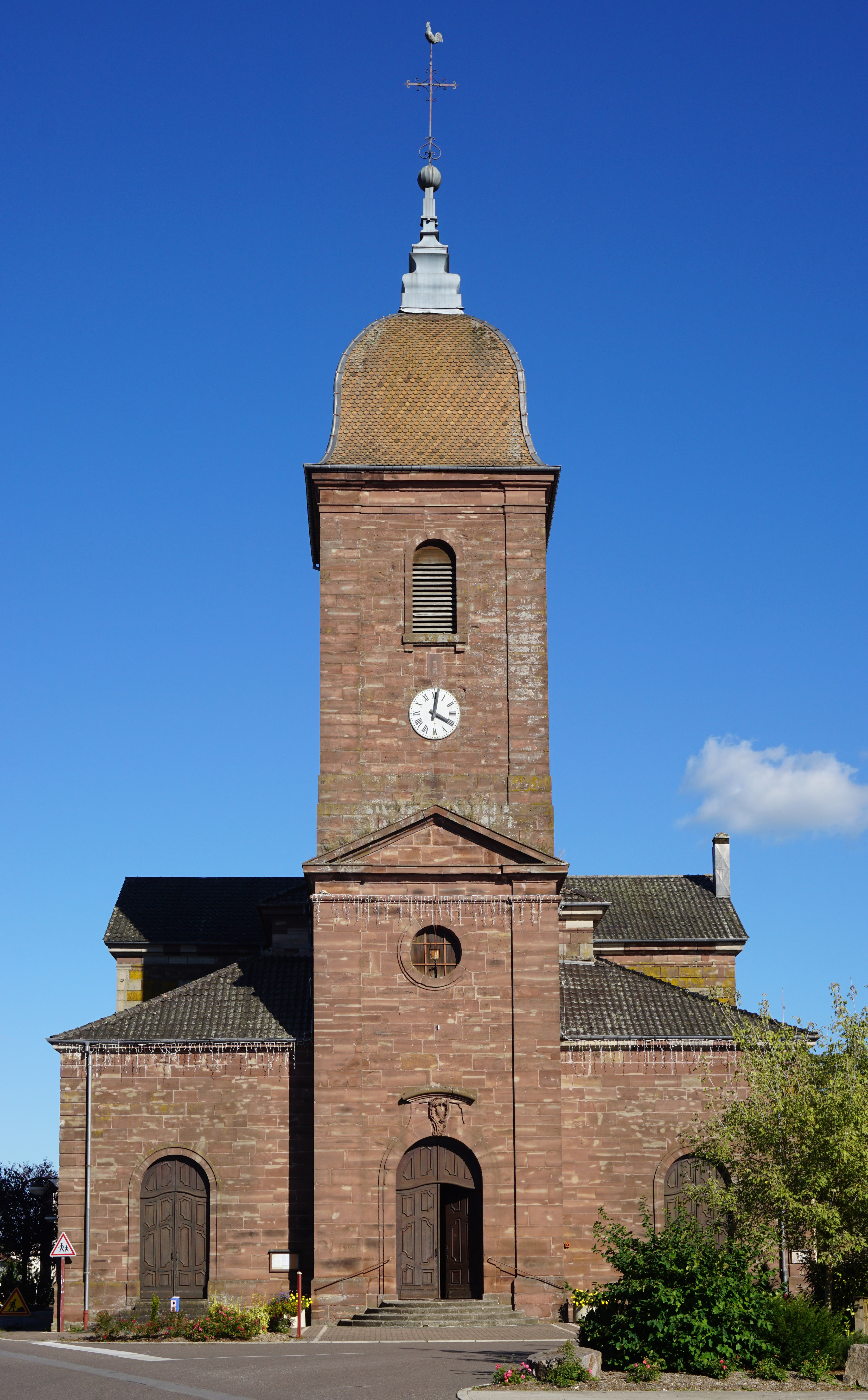 Église Saint-Laurent de Corbenay.